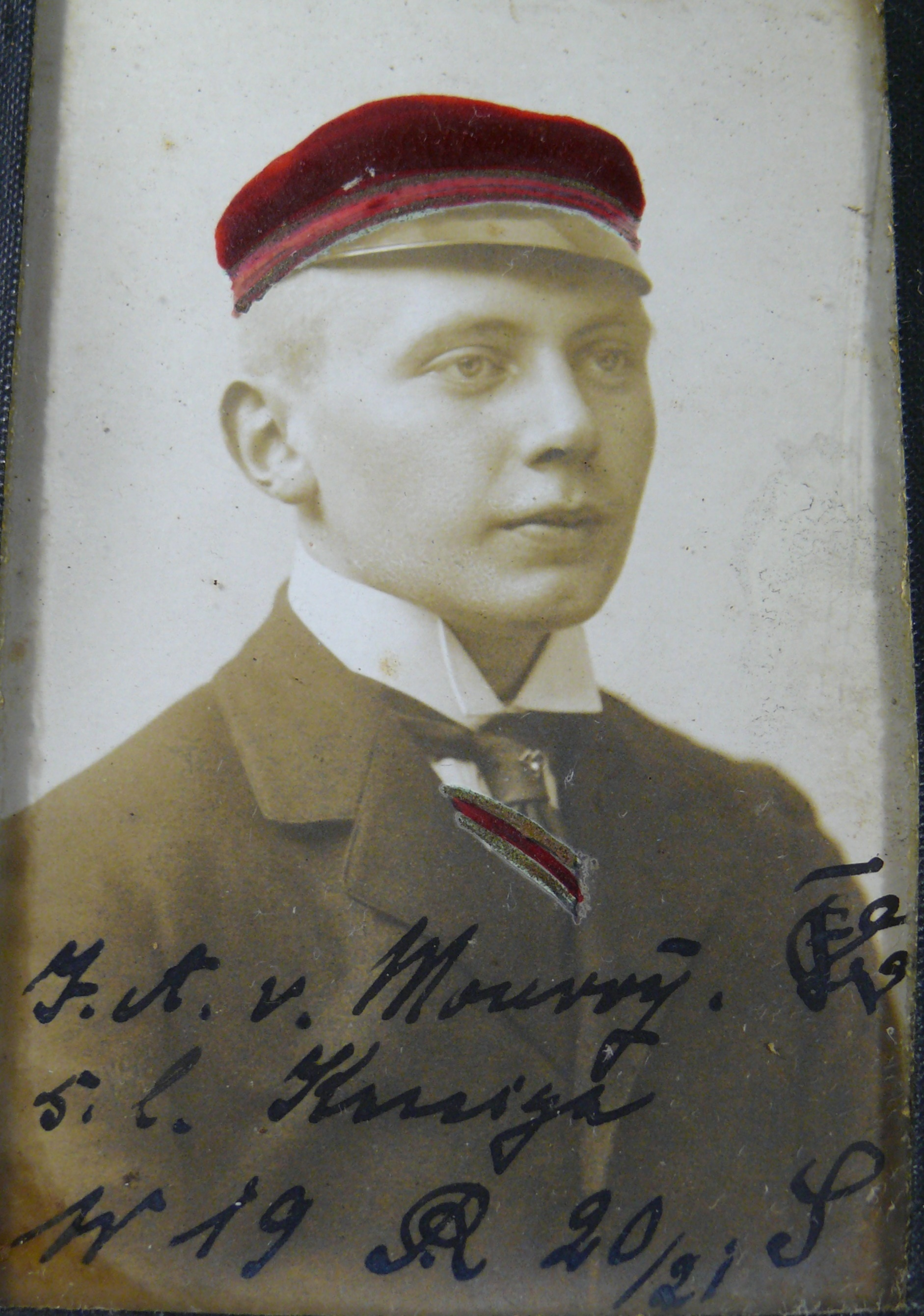 Porträtfotografie von Johann Albrecht von Monroy (1900-1964)